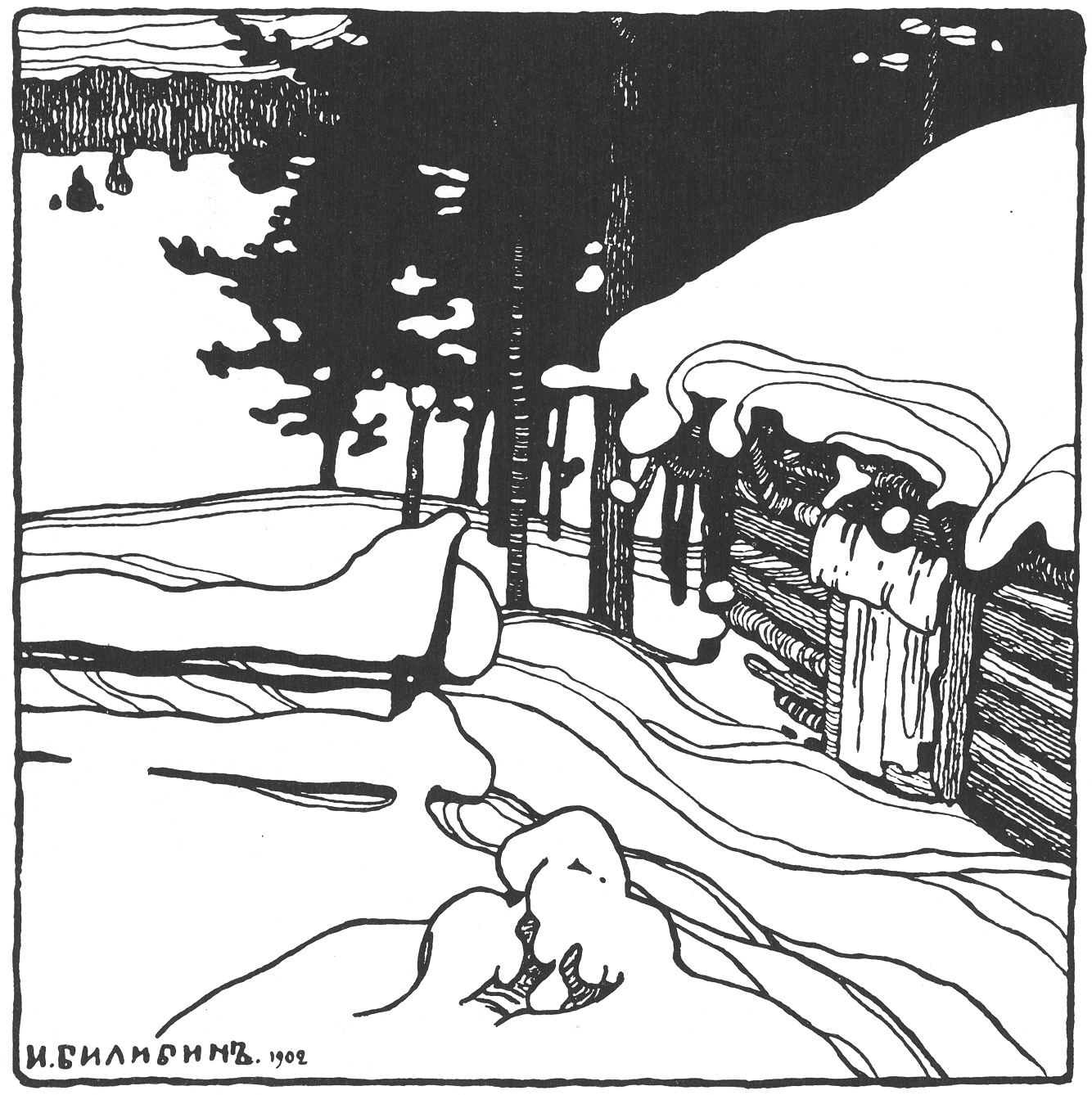 Концовка к статье «Остатки искусства в русской деревне».